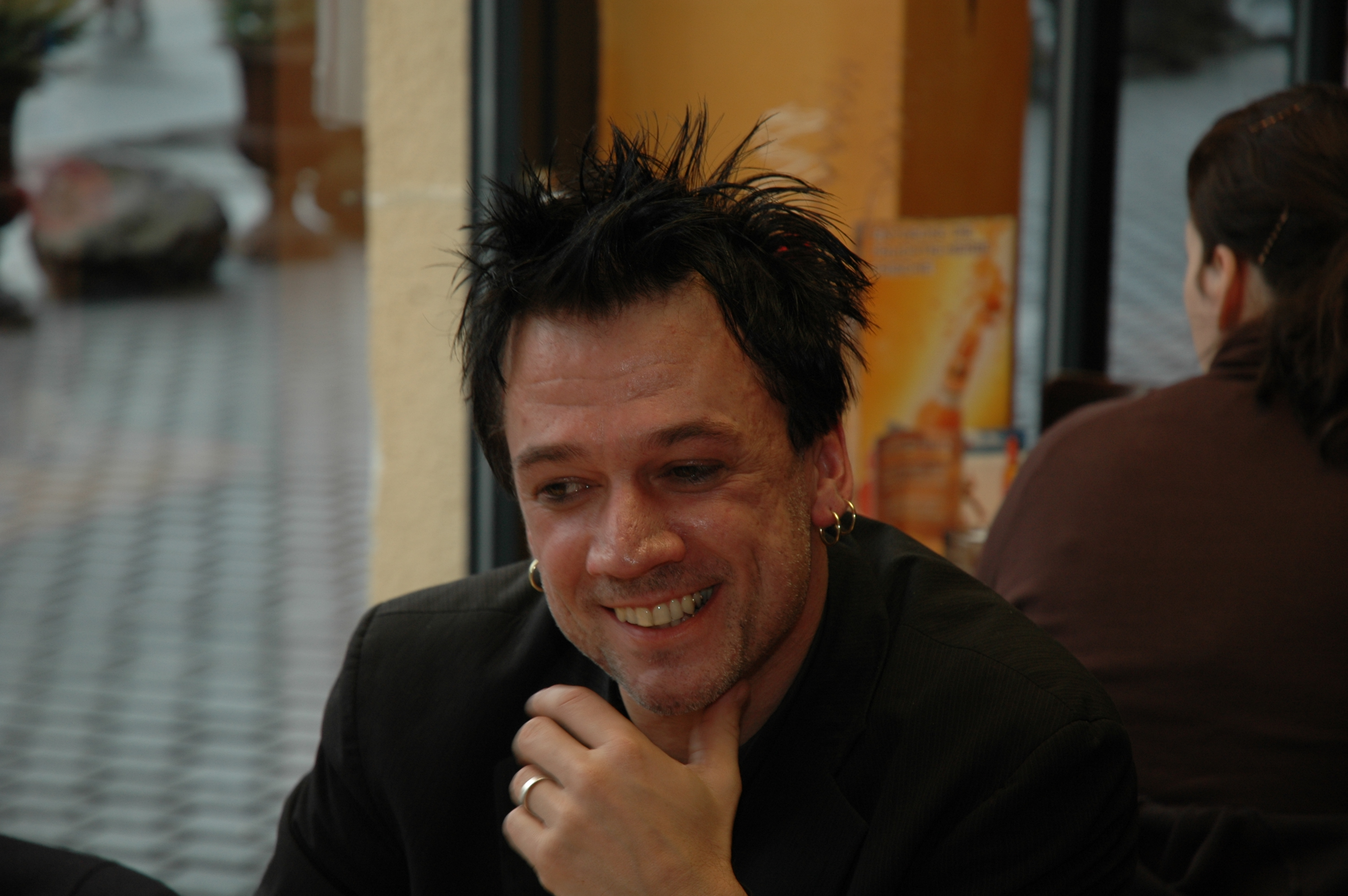 Der Sänger Jens Böttcher bei einem Interview mit dem Christlichen Medienmagazin pro am 13. Februar 2009